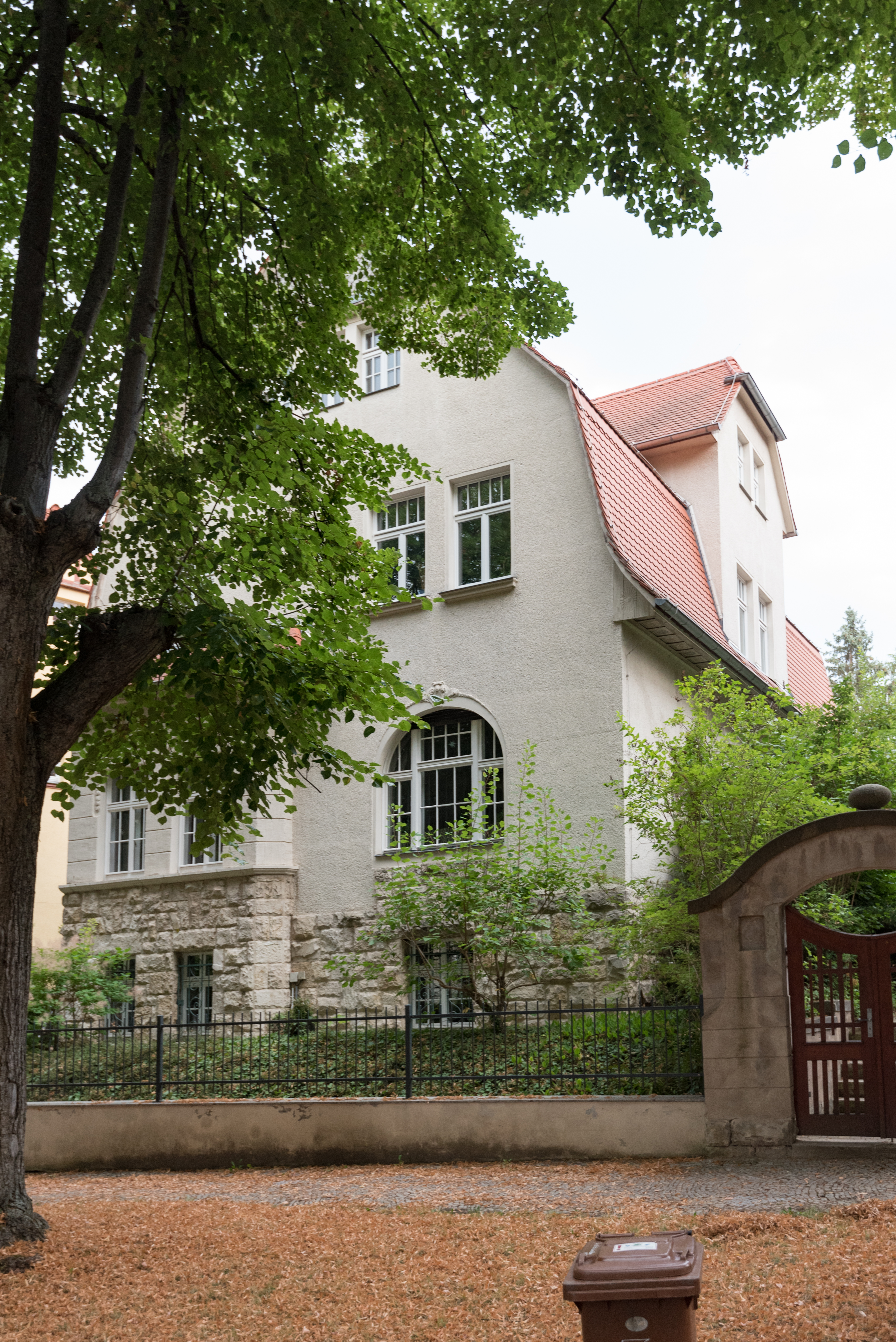 Naumburg (Saale), Buchholzstraße 18